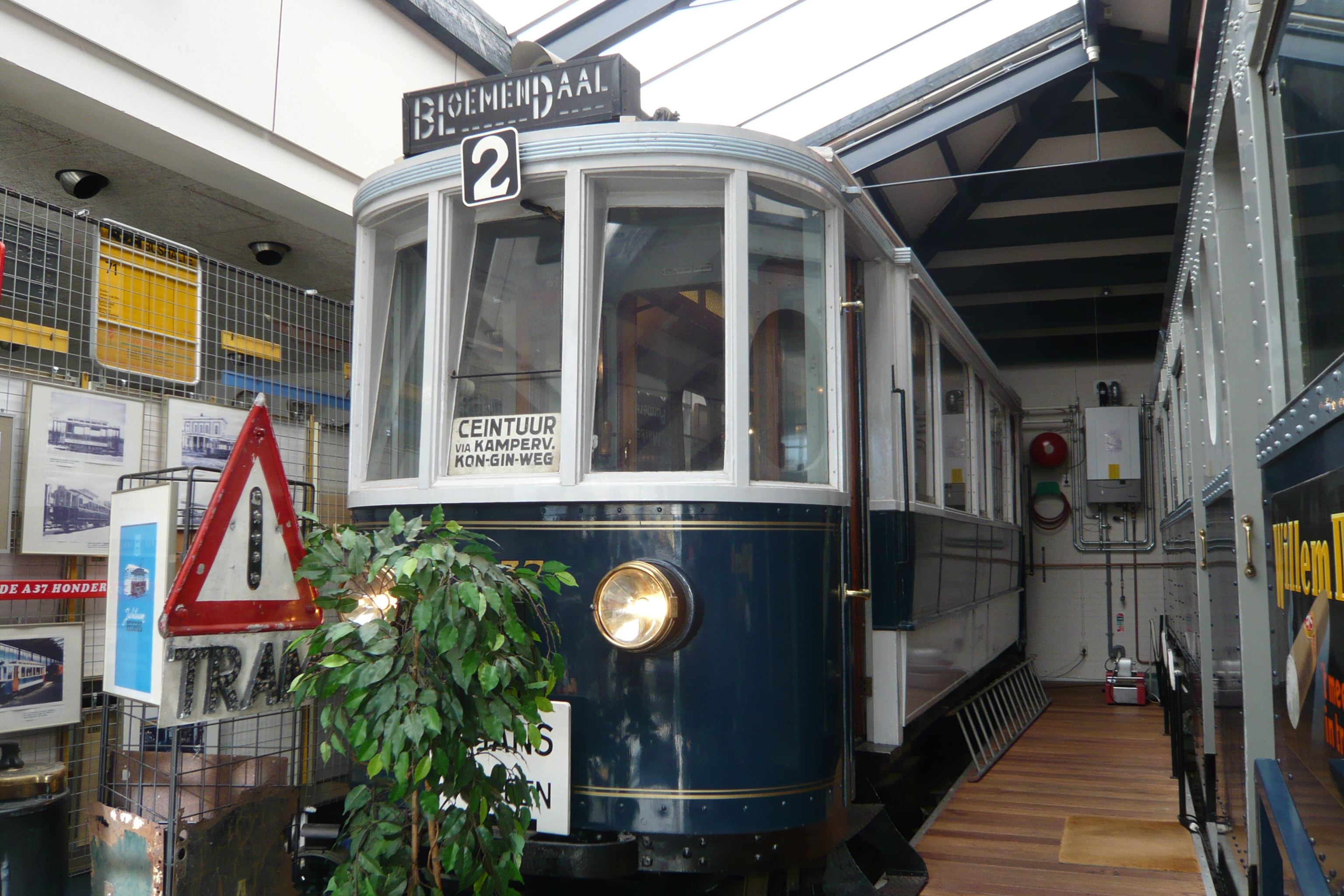 NZH Vervoer Museum, Leidsevaart 396, Haarlem Tram